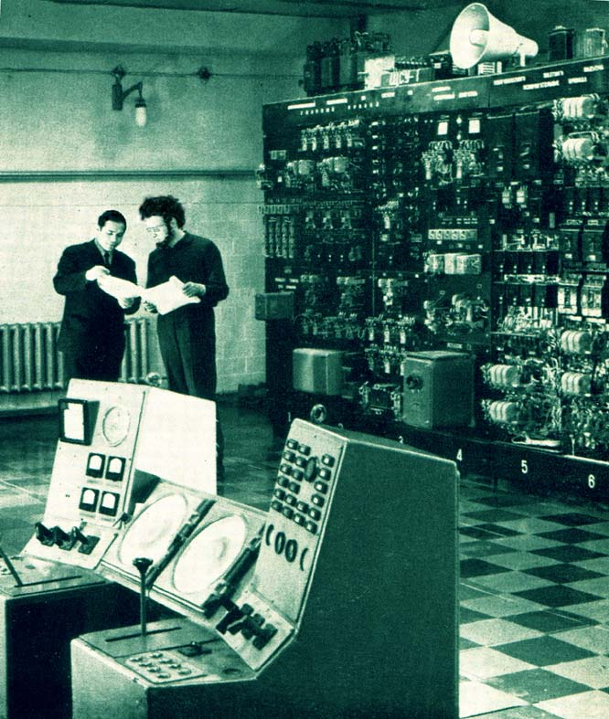 Brain Damage (photo officielle du groupe)